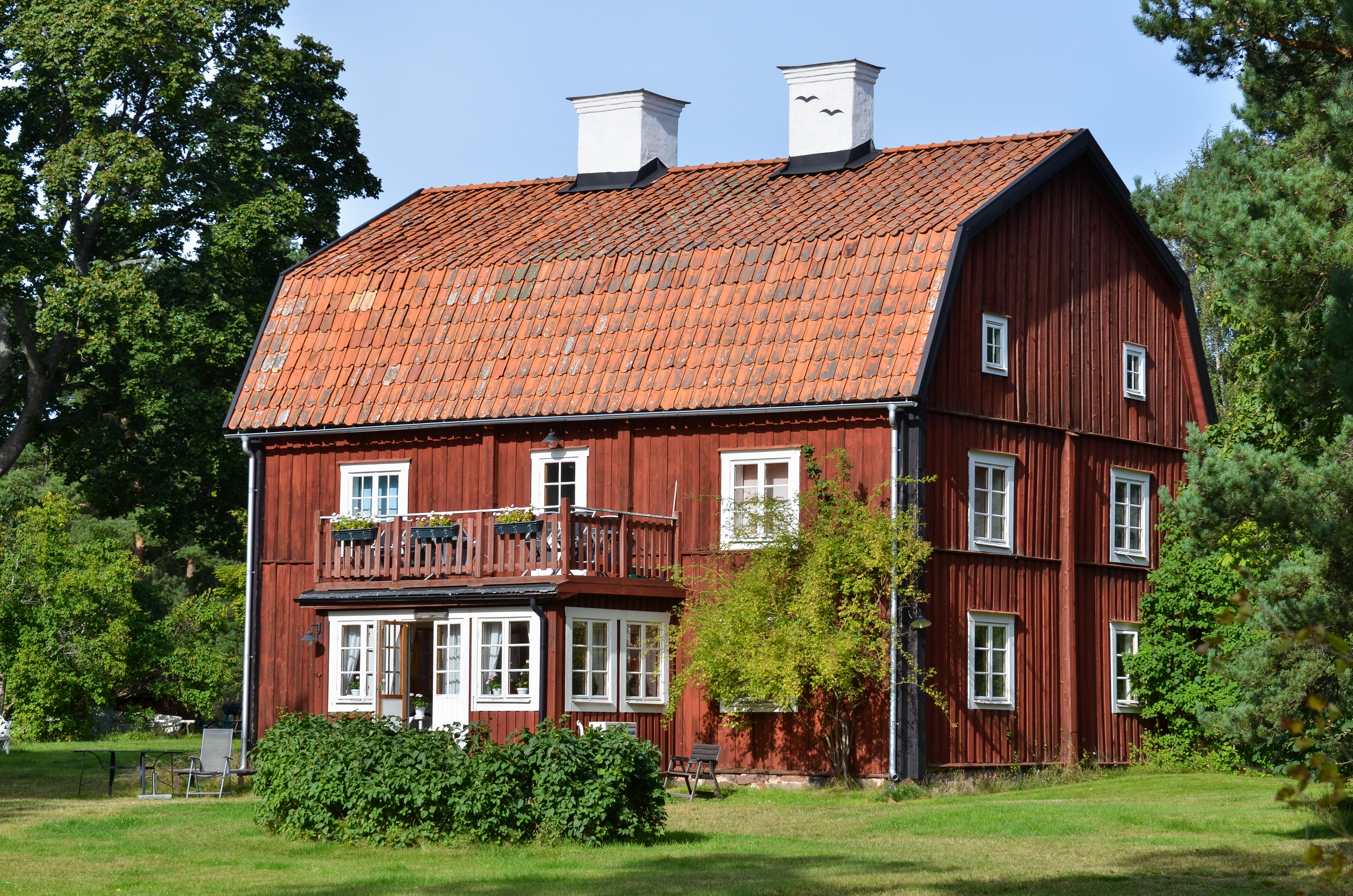 Edesnäs säteri built 1790 in Edesnäs, a small village at Utö island, Haninge Municipality, Stockholm archipelago.